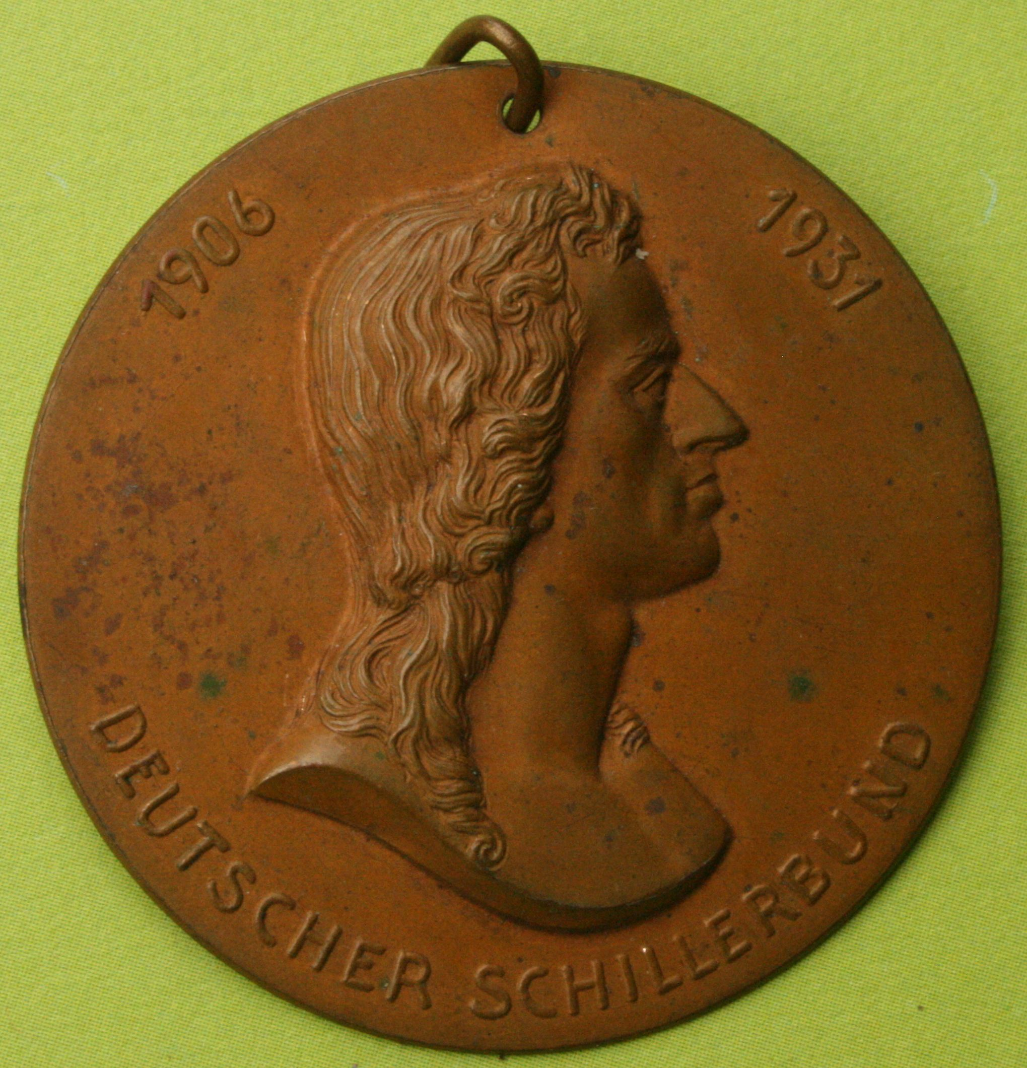 Plakette mit Relief Friedrich Schillers aus einem Kupfer-Messing-Material, Aufschrift: „1906 – 1931 Deutscher Schillerbund“, Durchmesser vier Zentimeter